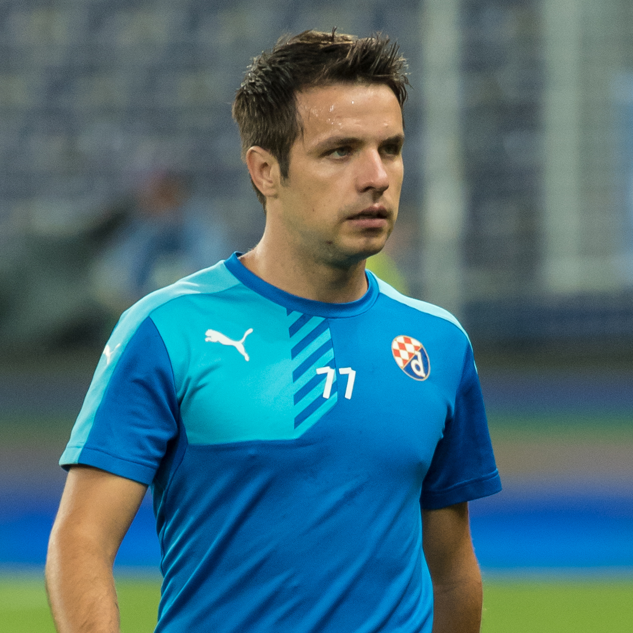 UEFA Champions League - Play-Offs - FC Salzburg vs Dinamo Zagreb. Bild zeigt Alexandru Matel (Dinamo Zagreb).